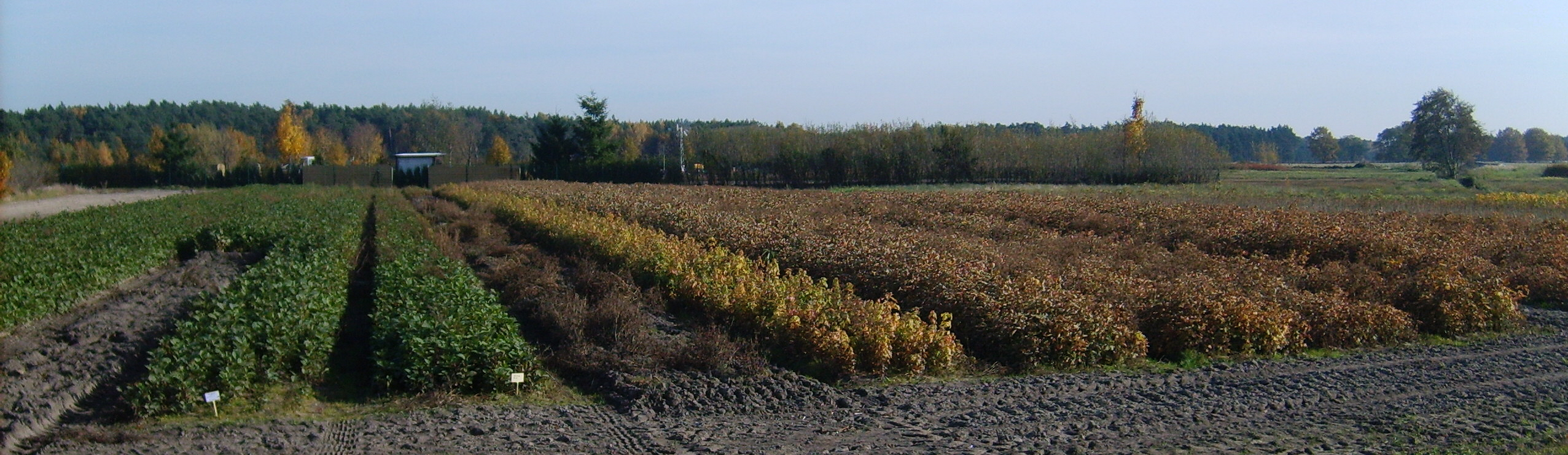 Baumschulen-Felder bei Haida.